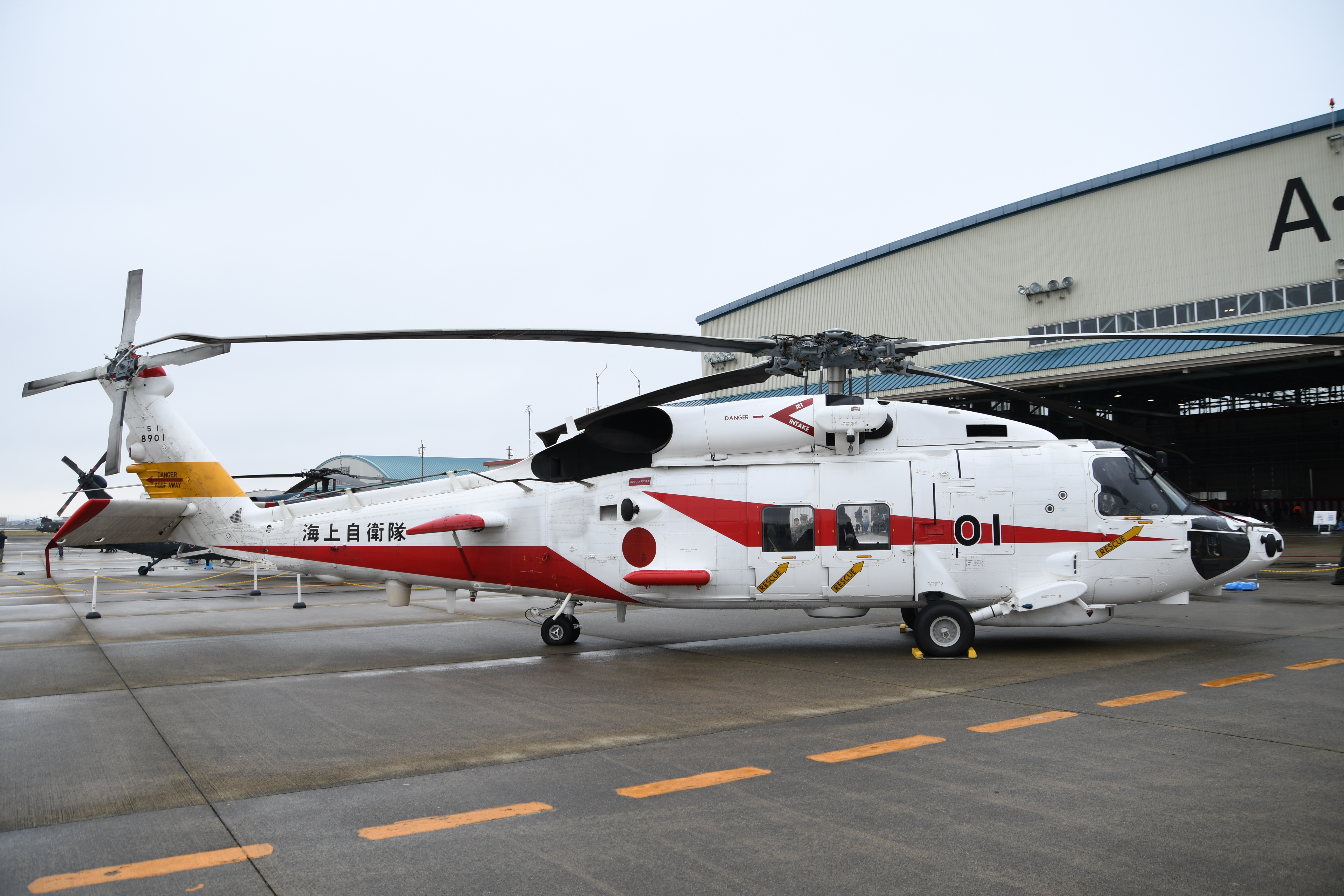 海上自衛隊 USH-60K多用途ヘリコプター（8901号機） 右側面。2018年11月4日 陸上自衛隊明野駐屯地にて。